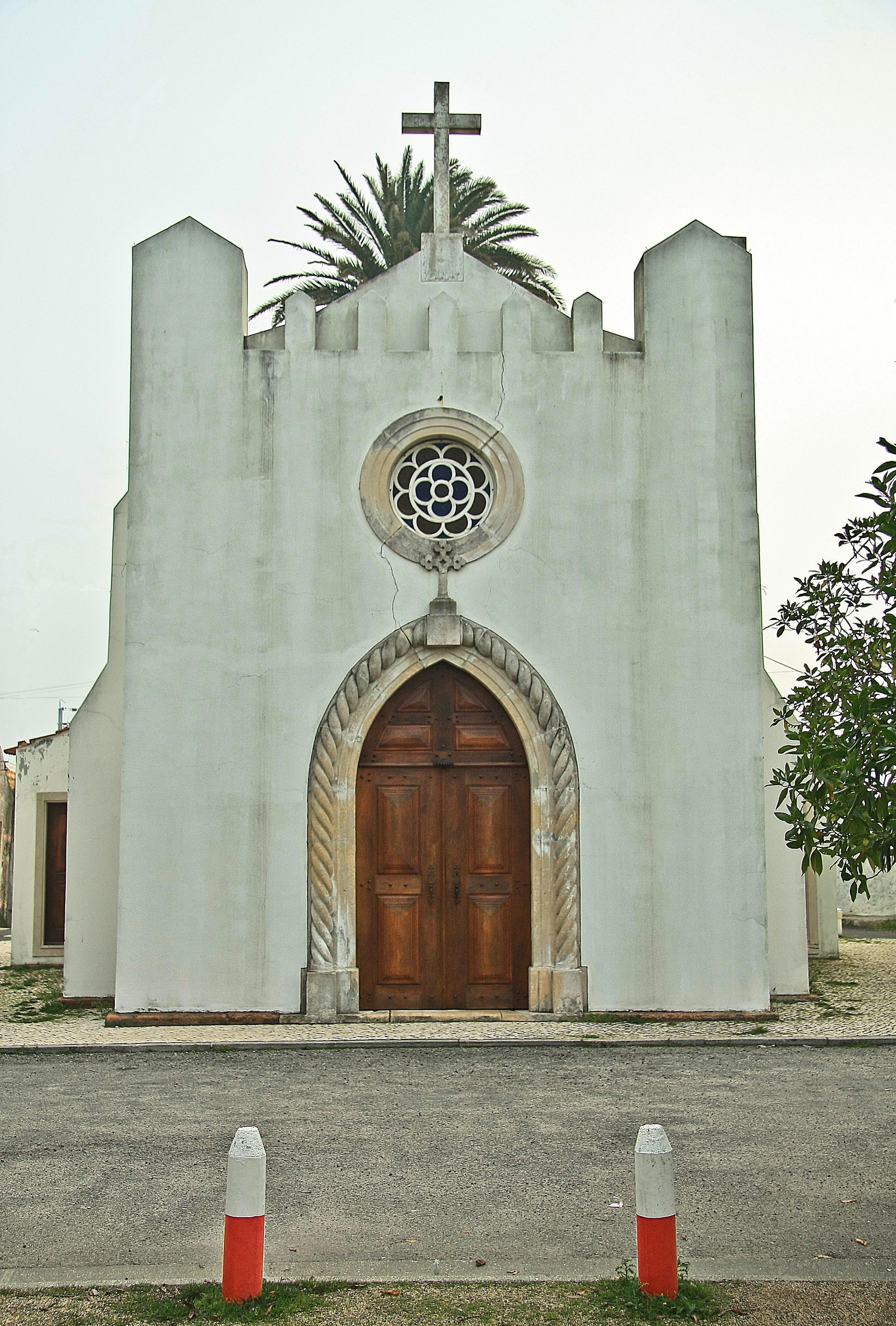 A Capela de Nossa Senhora dos Navegantes é o mais antigo templo católico das paróquias da península da Gafanha. Começou a ser construída a 3 de Dezembro de 1863, sob a direcção do engenheiro Silvério Pereira da Silva. O custo da obra foi de 400$000 réis. Este edifício é Património do Estado. Capela com as suas paredes ameadas e a ombreira da porta principal, de pedra de Ançã, lavrada em espiral com arco em ogiva. A Senhora dos Navegantes, que os nossos pescadores e mareantes tanto veneraram nos tempos dos nossos avós, não deixará, contudo, com a sua ternura de Mãe, de velar por quantos sulcam as águas do mar, não já na Faina Maior, que o bacalhau que comemos já é mais importado do que pescado pelos portugueses, mas sobretudo nos transportes marítimos e na pesca costeira. Celebra-se a sua festa na última segunda-feira de Setembro com enorme concorrência de forasteiros das Gafanhas, de Ílhavo e Aveiro. See where this picture was taken. [?]